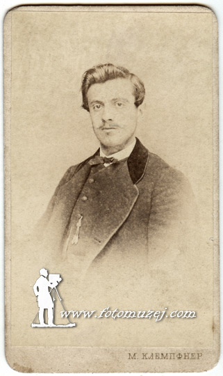 Светозар Марковић, 1869. год, Фотомузеј